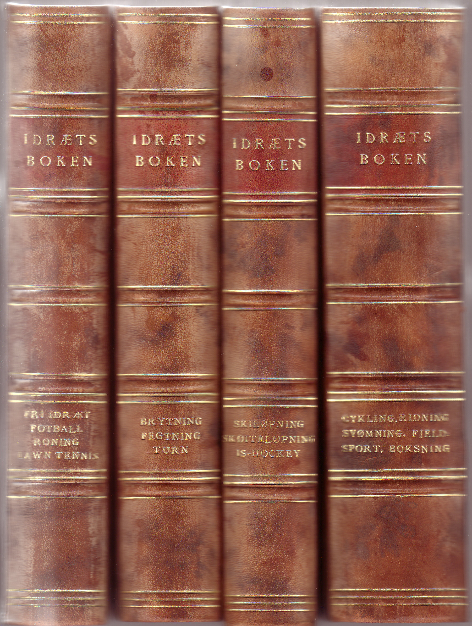 Ryggen til 4 bind av Idrætsboken